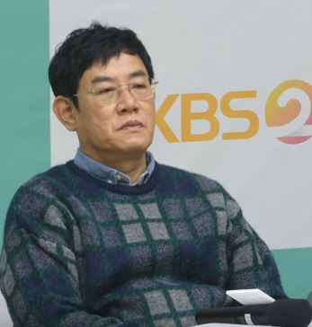 25일 오전 서울시 영등포구 여의도동 KBS에서 KBS 새 예능 '신상출시 편스토랑' 제작발표회가 열려 이경규와 이영자가 첫 예능 동반 출연 소감에 대해 이야기하고 있다.